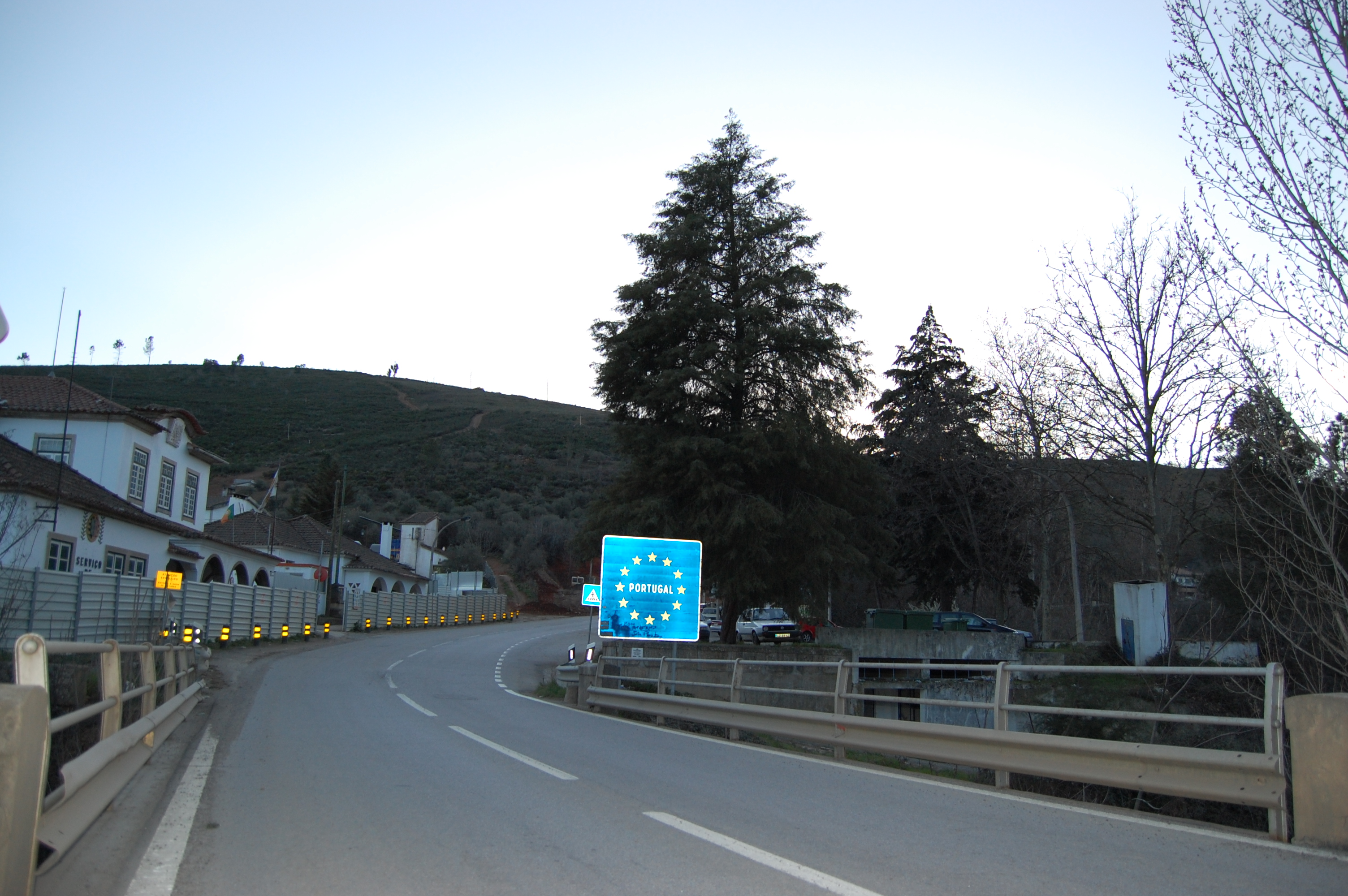 A fronteira entre Portugal (Quintanilha e Espanha (Trabazos.